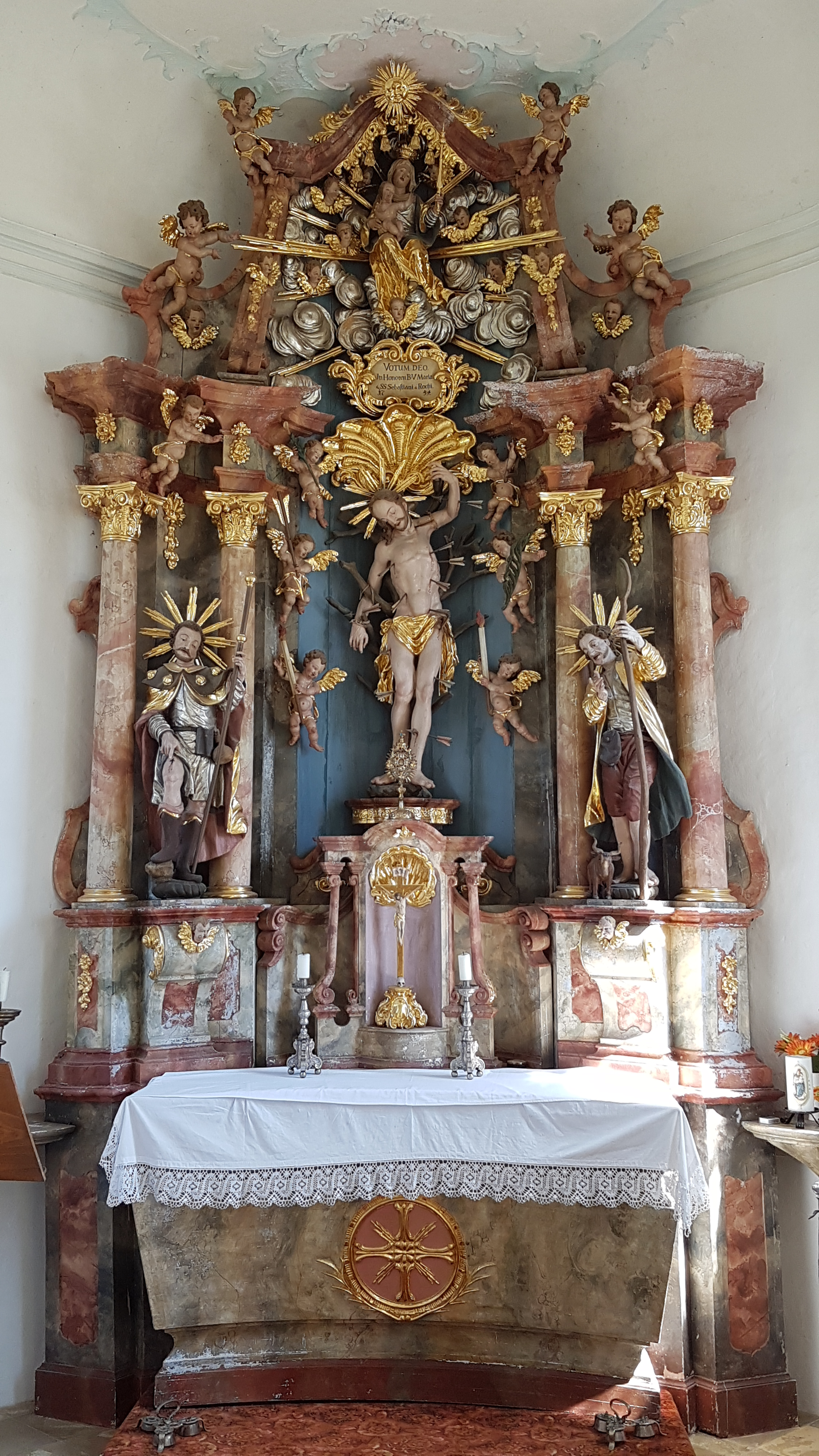 Eching am Ammersee, Kapelle St. Sebastian